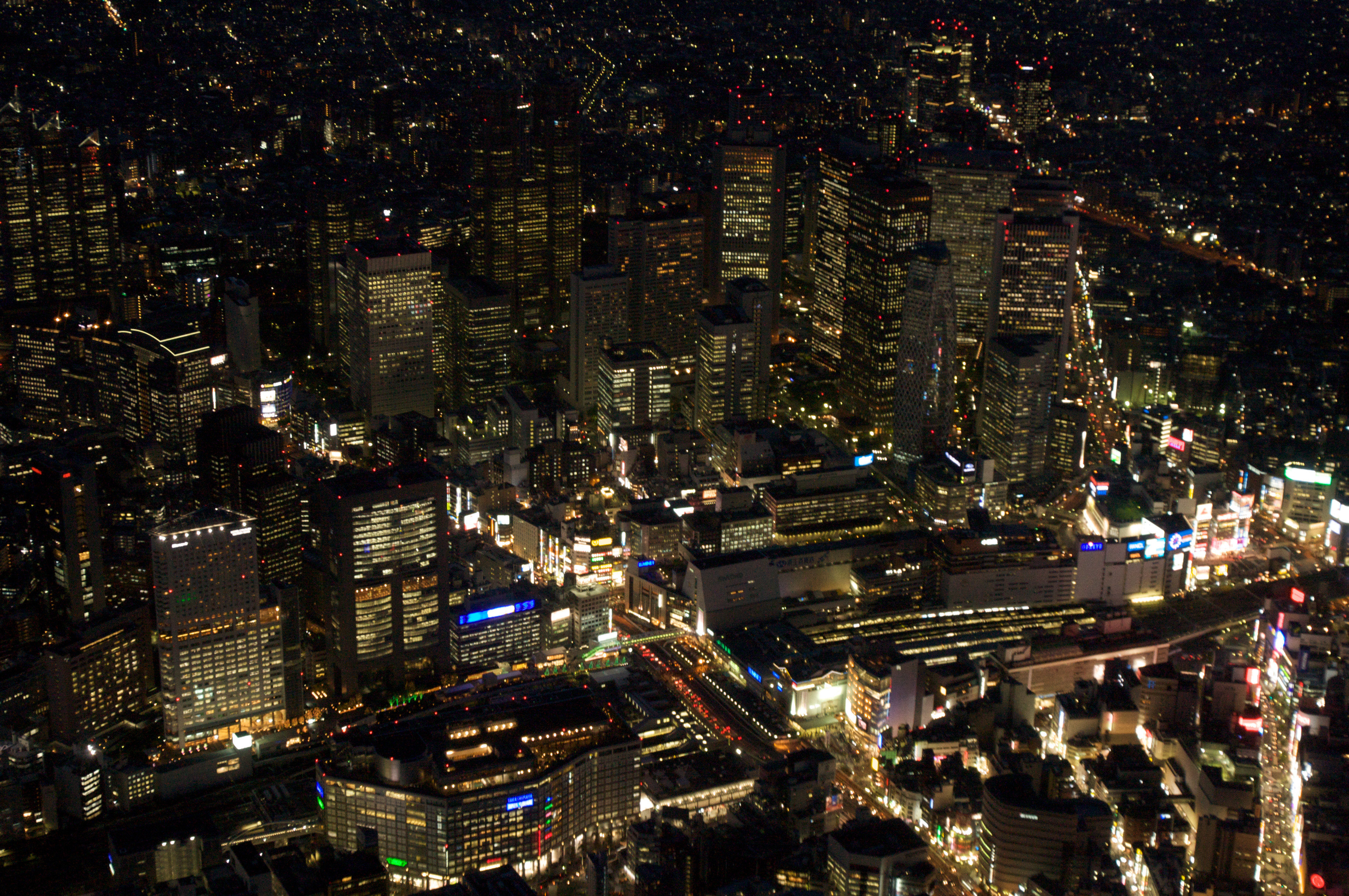 Shinjuku station, Tokyo, Japan. Aerial photo taken at night.